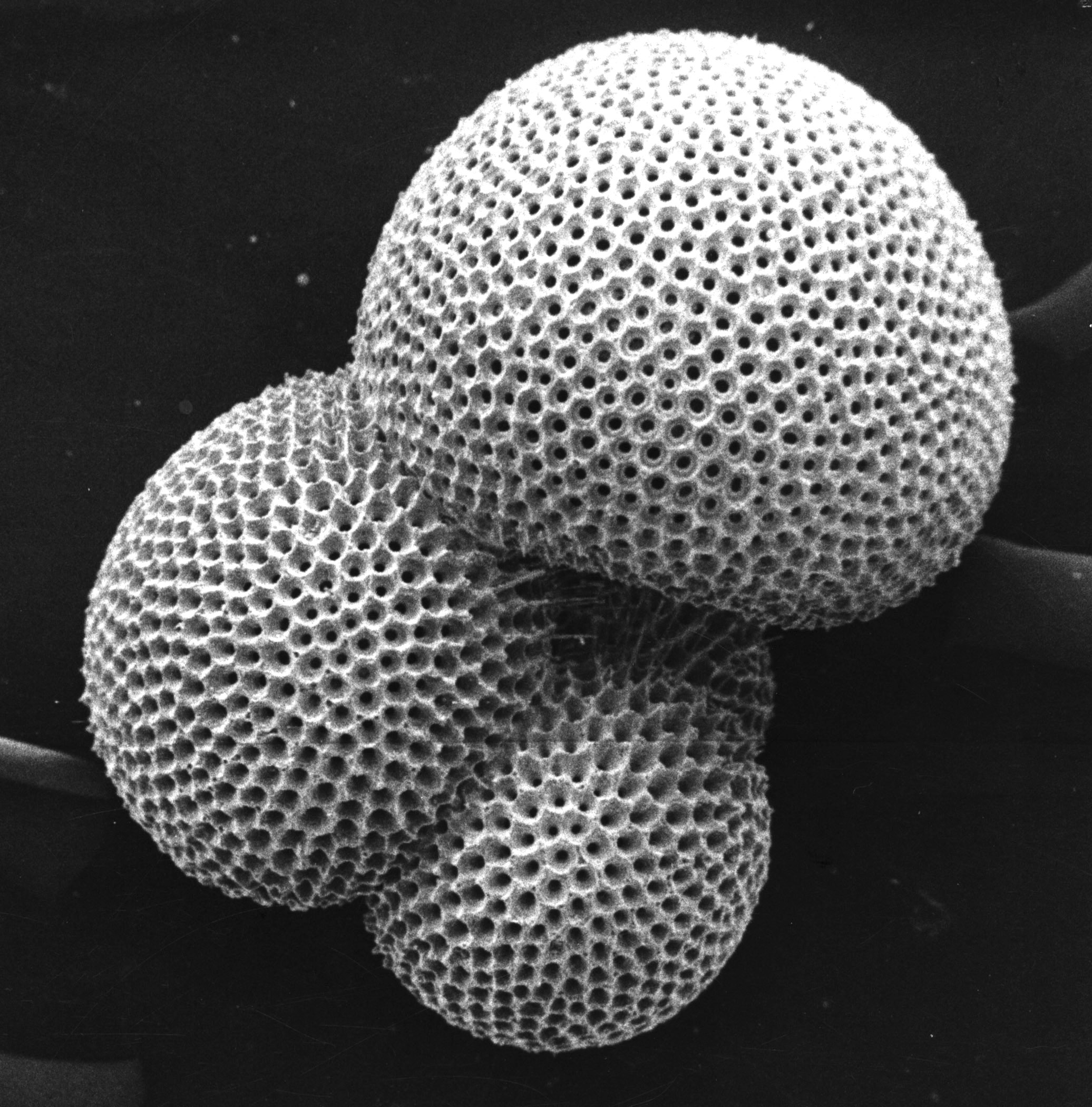 Globigerina (planktonic foraminifera) ab. 500 µm